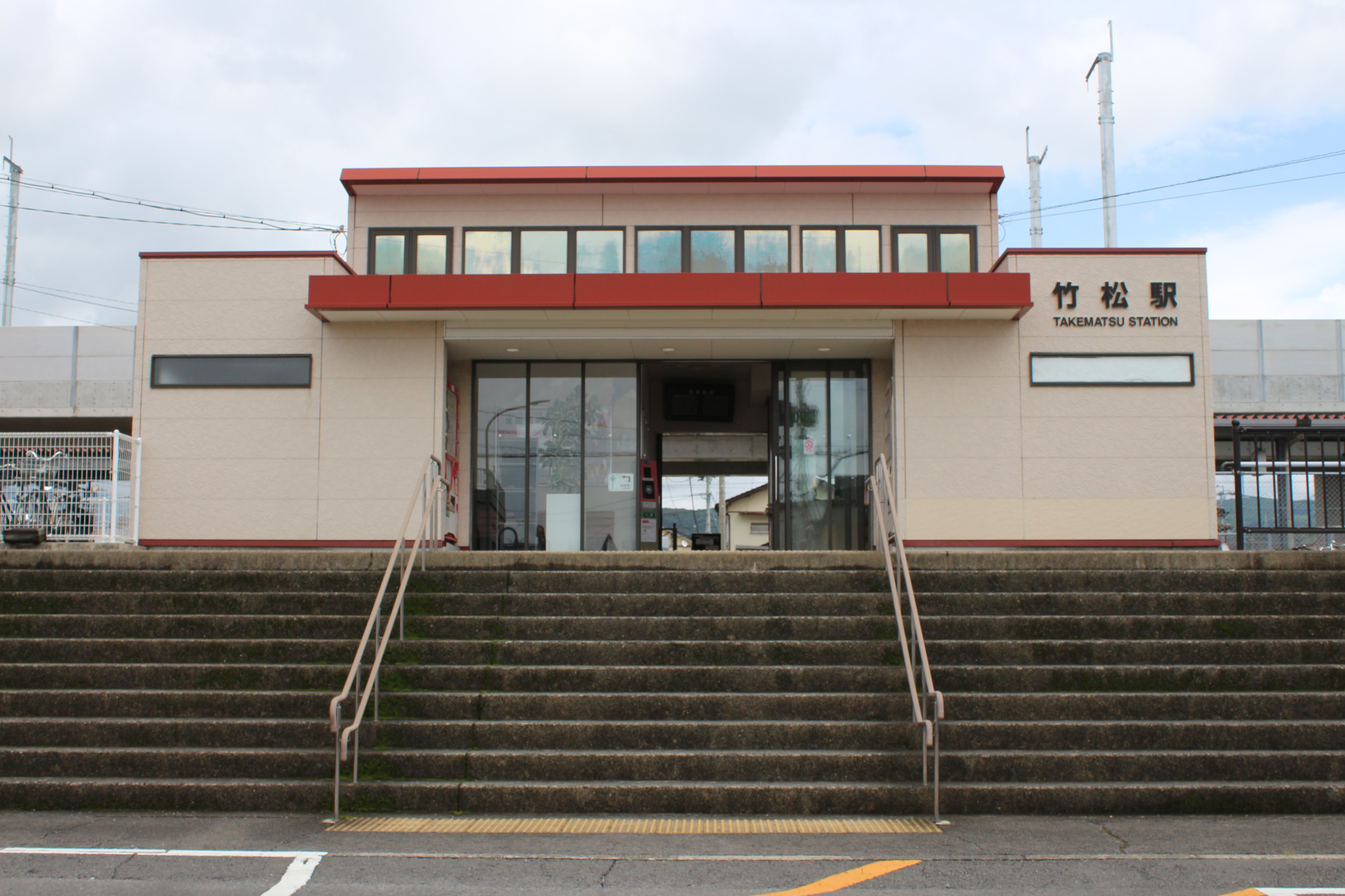 JR九州大村線竹松駅